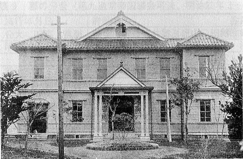 郡制において置かれた氷見郡役所